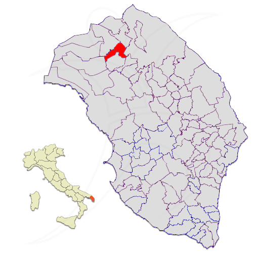 Il territorio del comune di Novoli in provincia di Lecce